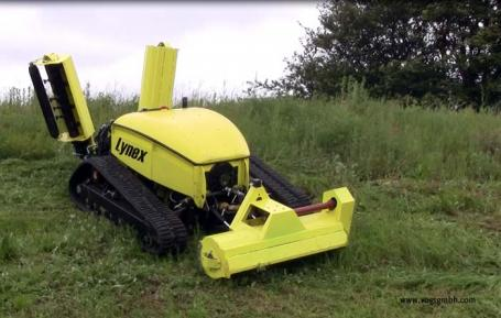 Косилка-робот